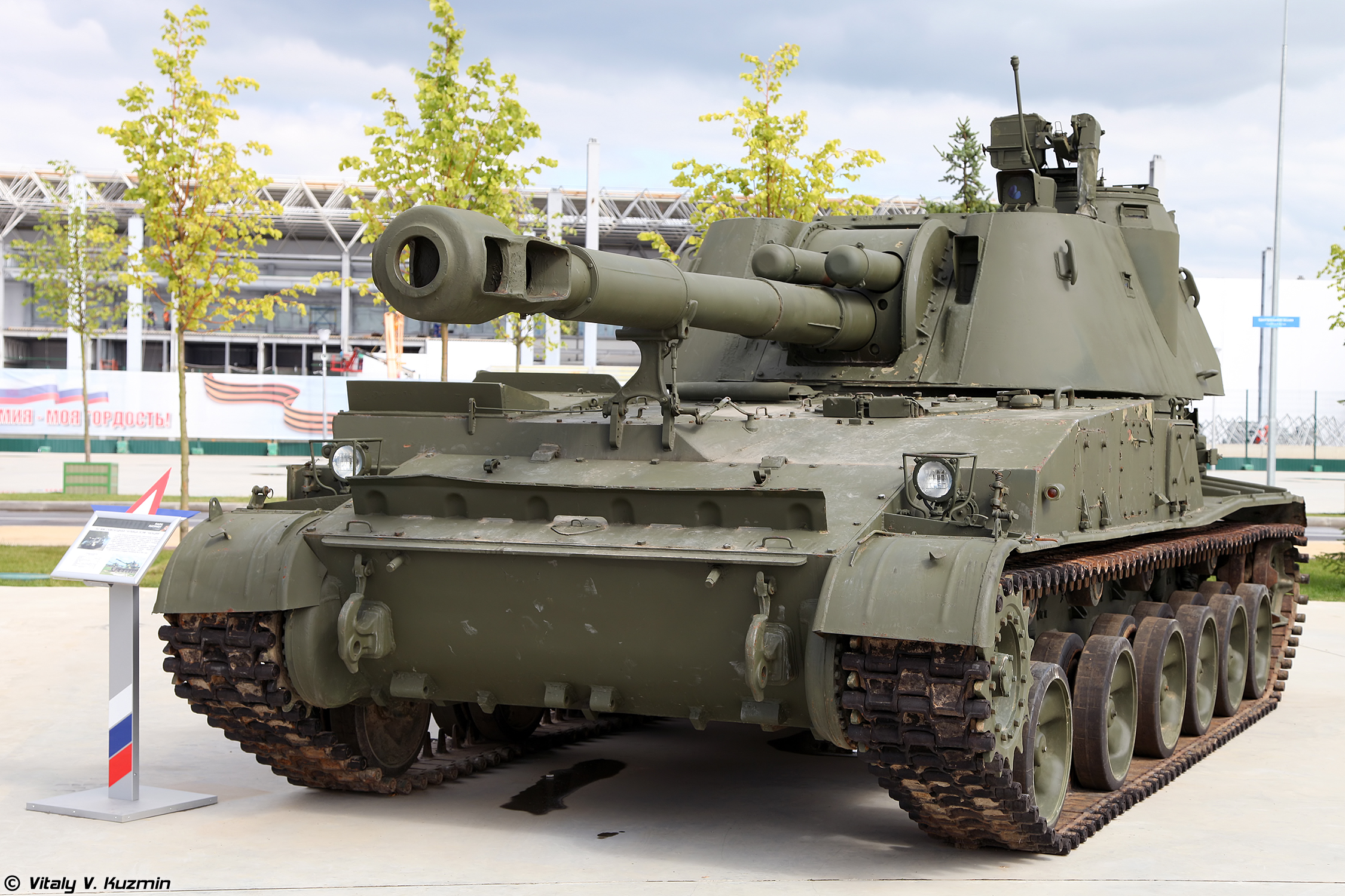 2С3 Акация (2S3 Akatsiya self-propelled artillery)